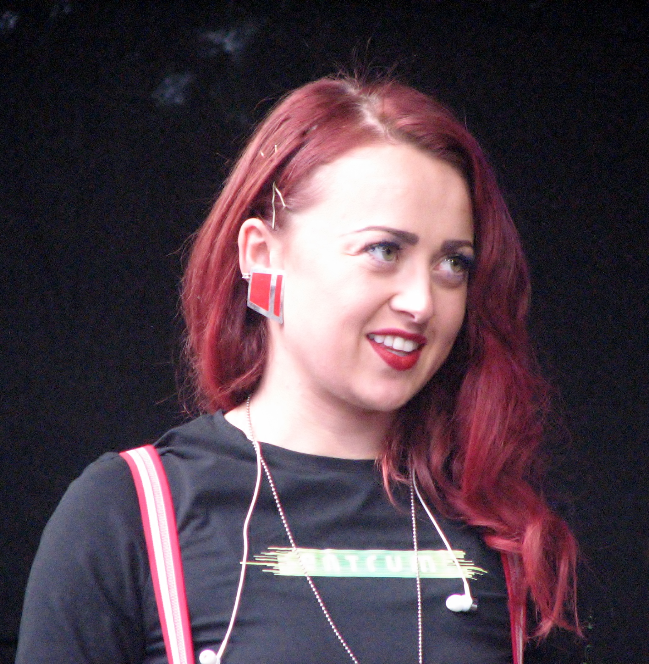 Teele Viira esinemas vabaajamessil No vaata!